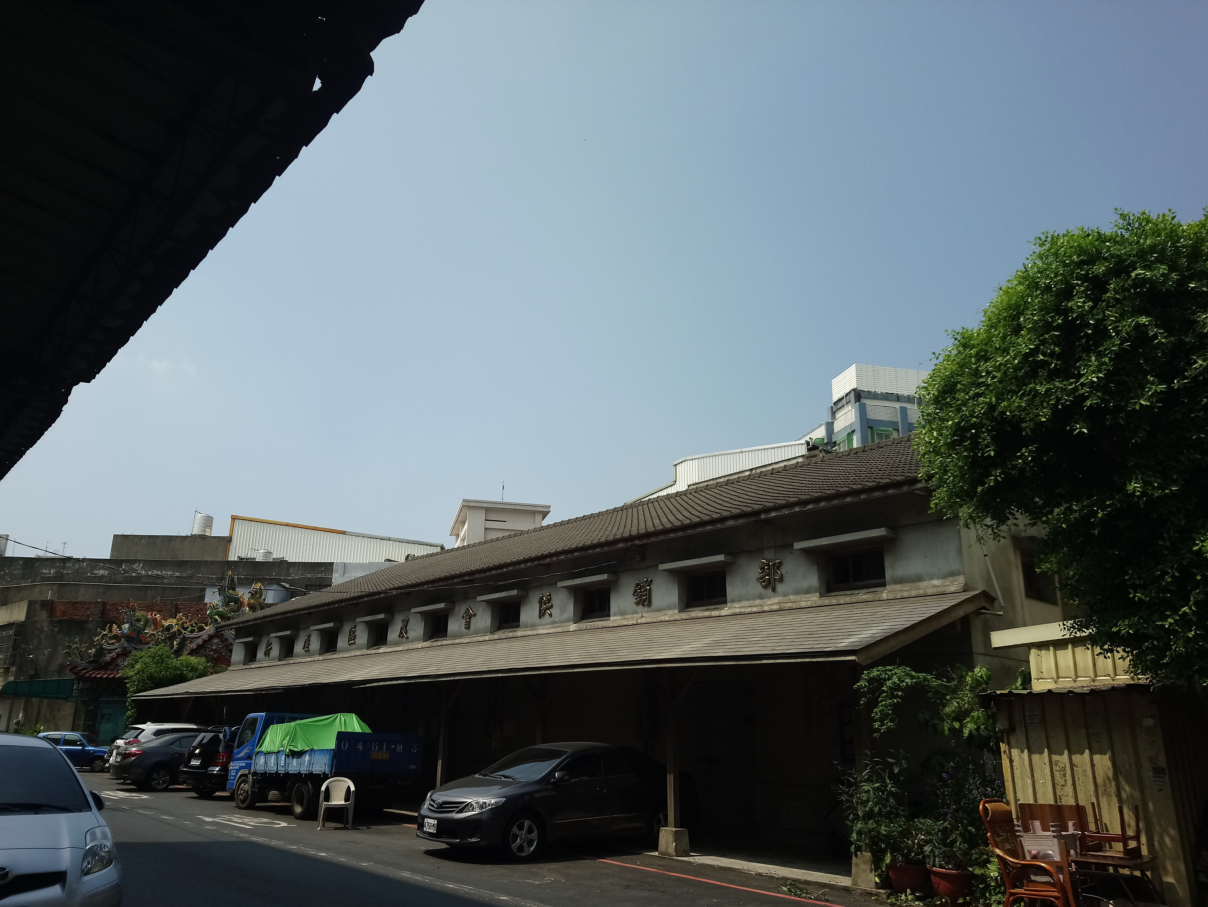 新屋區農會供銷部,桃園市新屋區新屋次分區新屋里